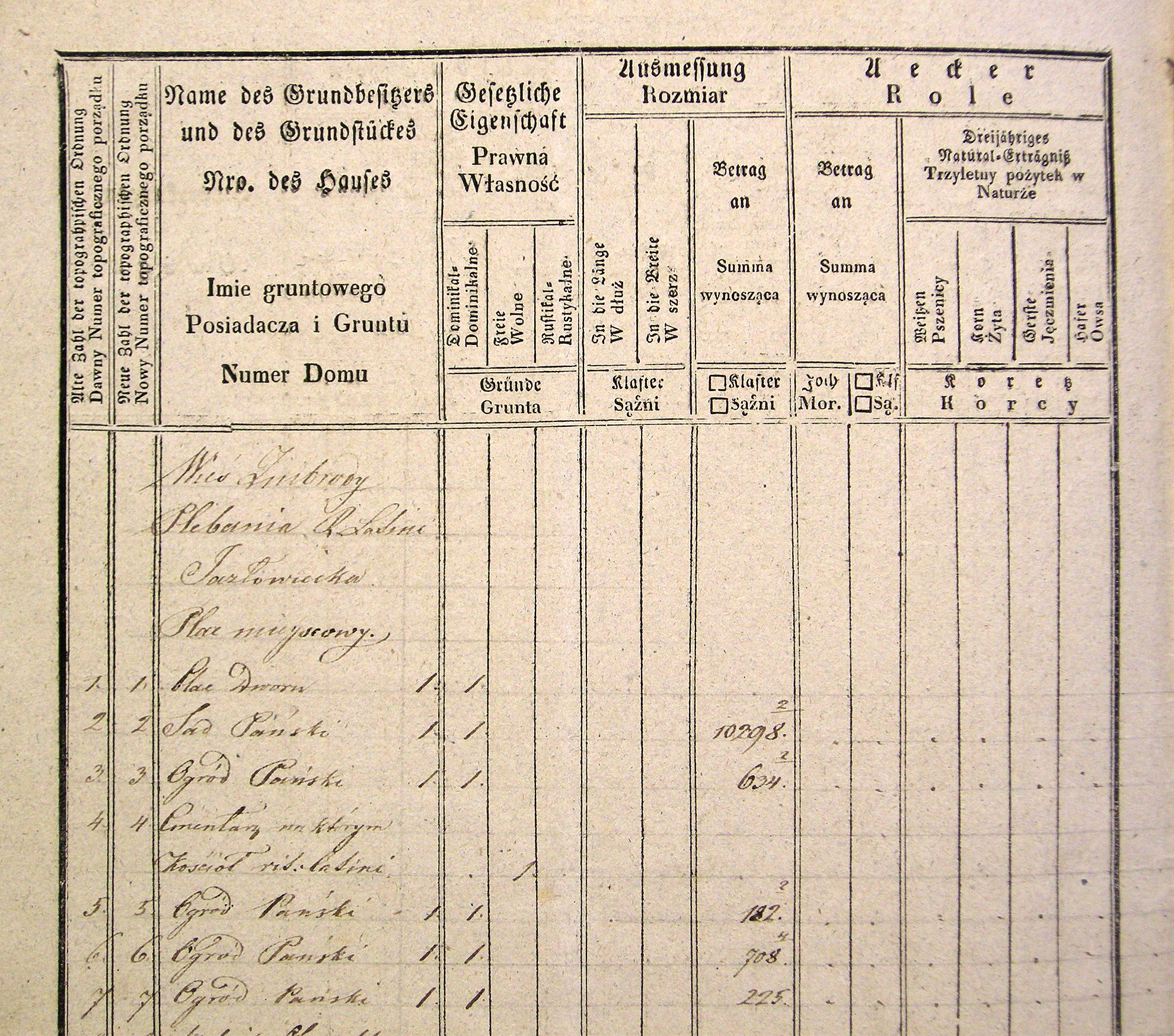 Фрагмент Францисканської метрики с. Жнибороди Заліщицького циркулу Королівства Галичини та Володимирії Австро-Угорської імперії.